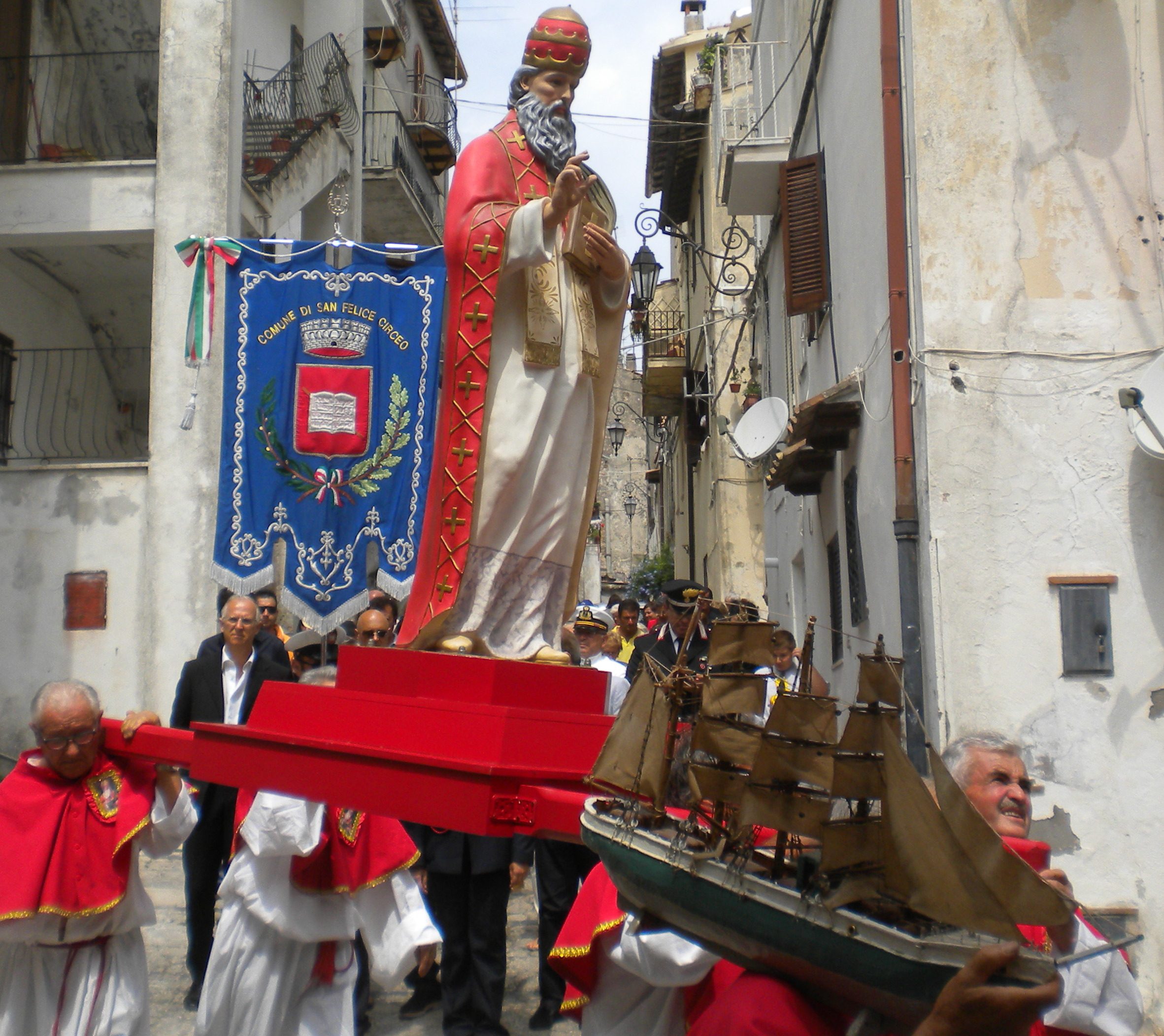 La Statua di San Felice Martire con la barchetta in processione per le vie del borgo antico di san Felice Circeo il 29 Luglio 2014.